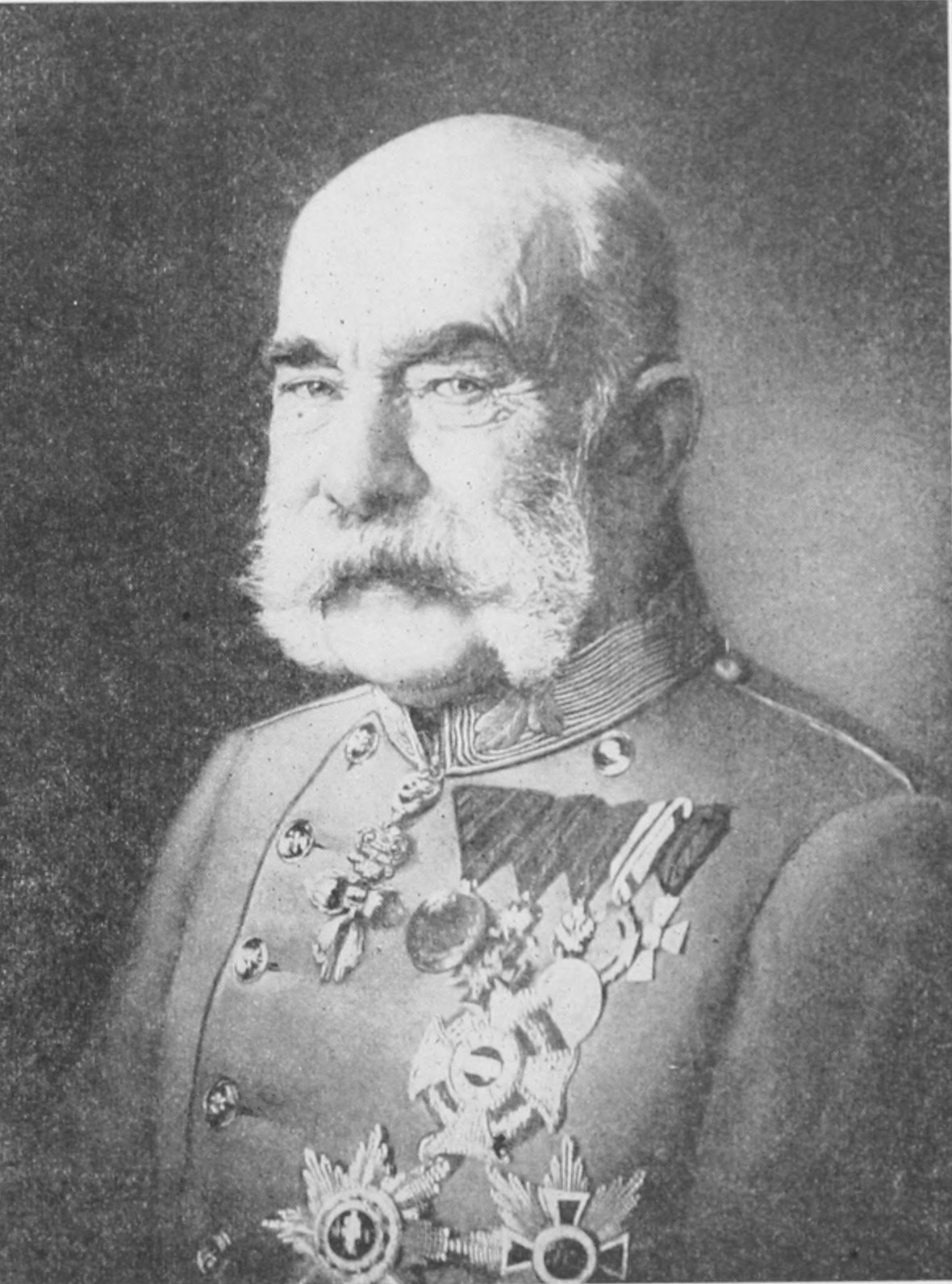 El emperador autrohúngaro Francisco José.